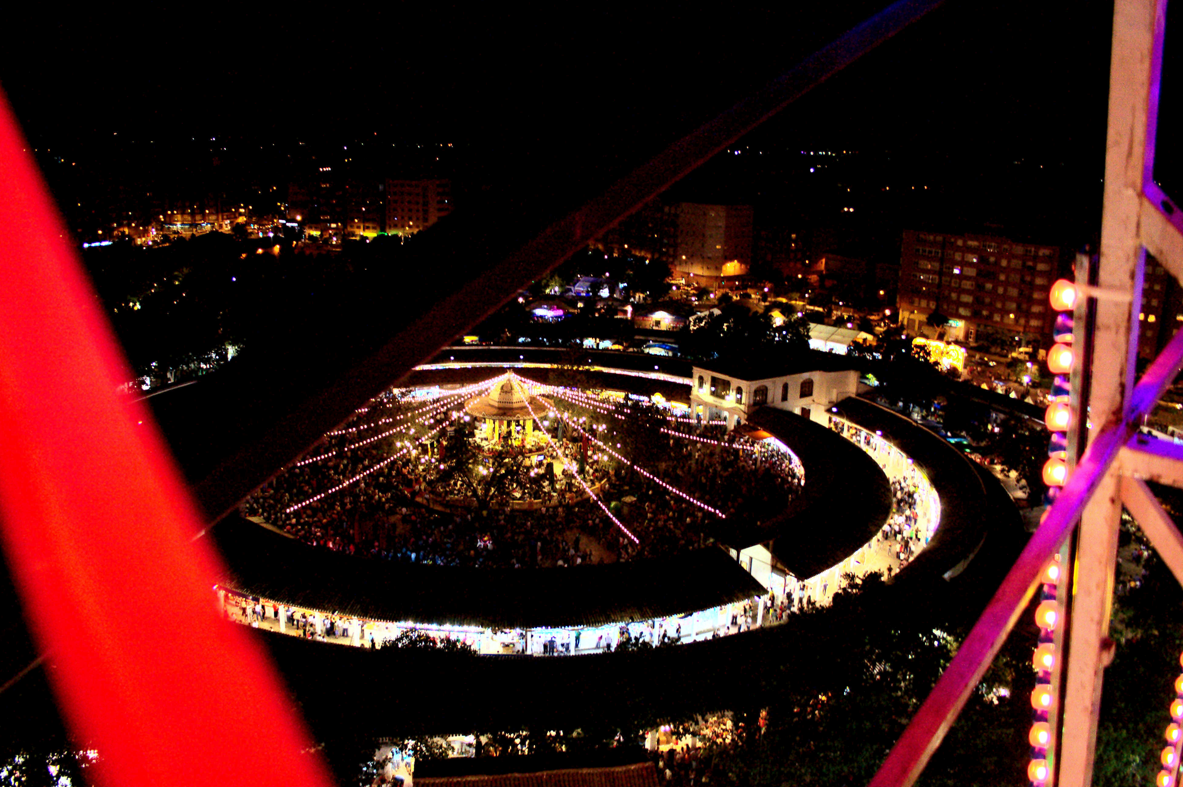 Se puede ver en